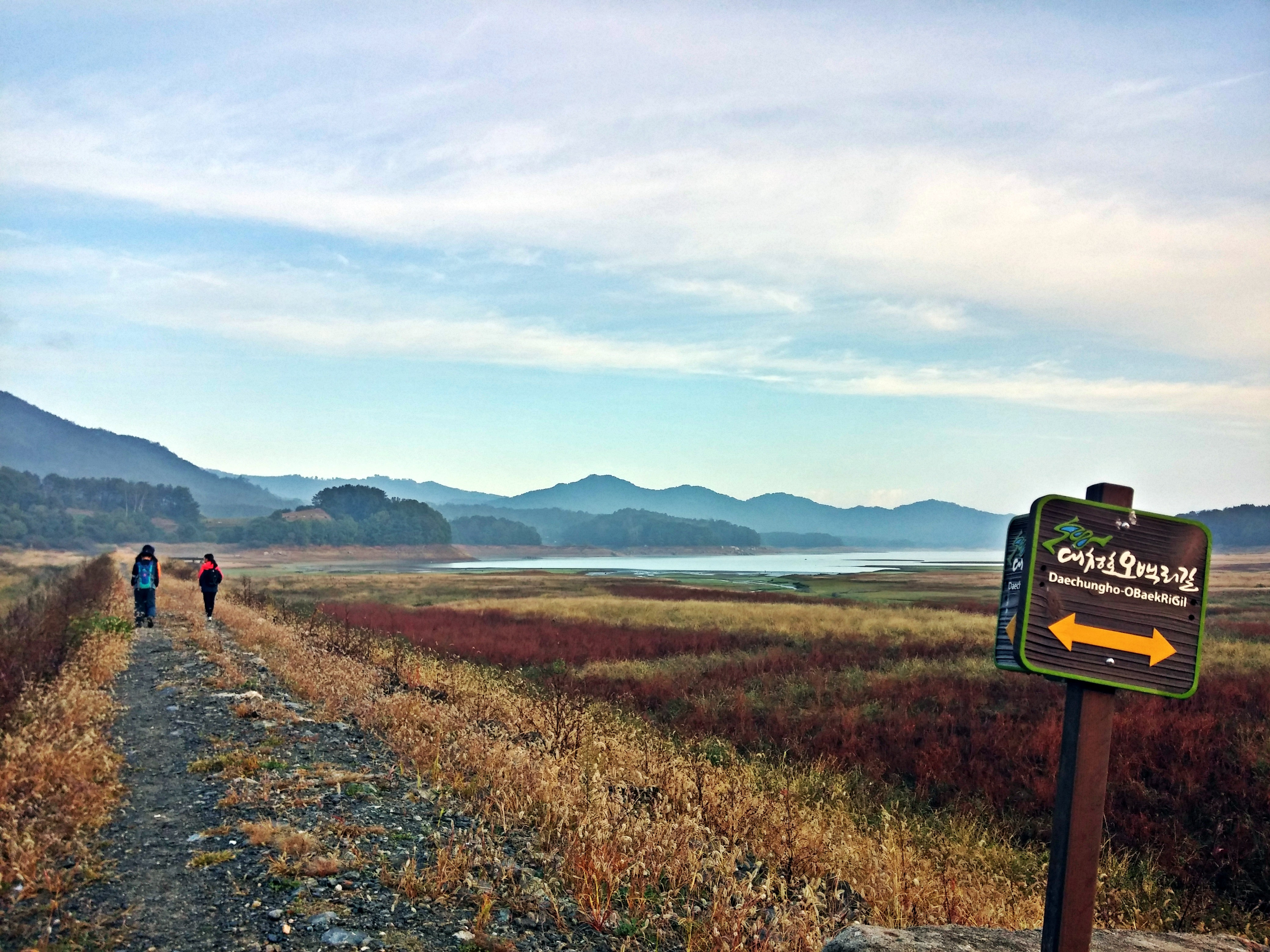 대청호오백리길 4구간_2